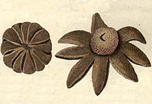 Zeichnung vom Wetterstern (Pilz des Jahres 2005). Titel: Wetterstern (Astraeus hygrometricus) Quelle: Die Zeichnung stammt aus "Das System der Pilze und Schwämme" (1816) von Christian Gottfried Daniel Nees von Esenbeck. (Siehe auch: [1]) Beschreibung: Die Abbildung ist aufgrund ihres Alters gemeinfrei und zeigt einen Wetterstern. Dieser Pilz spreizt bei Feuchtigkeit seine Zacken, und bei Trockenheit rollen diese sich wieder ein. Aufgrund dieser Eigenschaft wurde der Wetterstern jahrhundertelang zur Wettervorhersage verwendet.